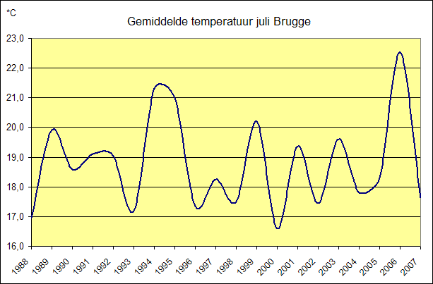 Temperatuur Brugge in juli